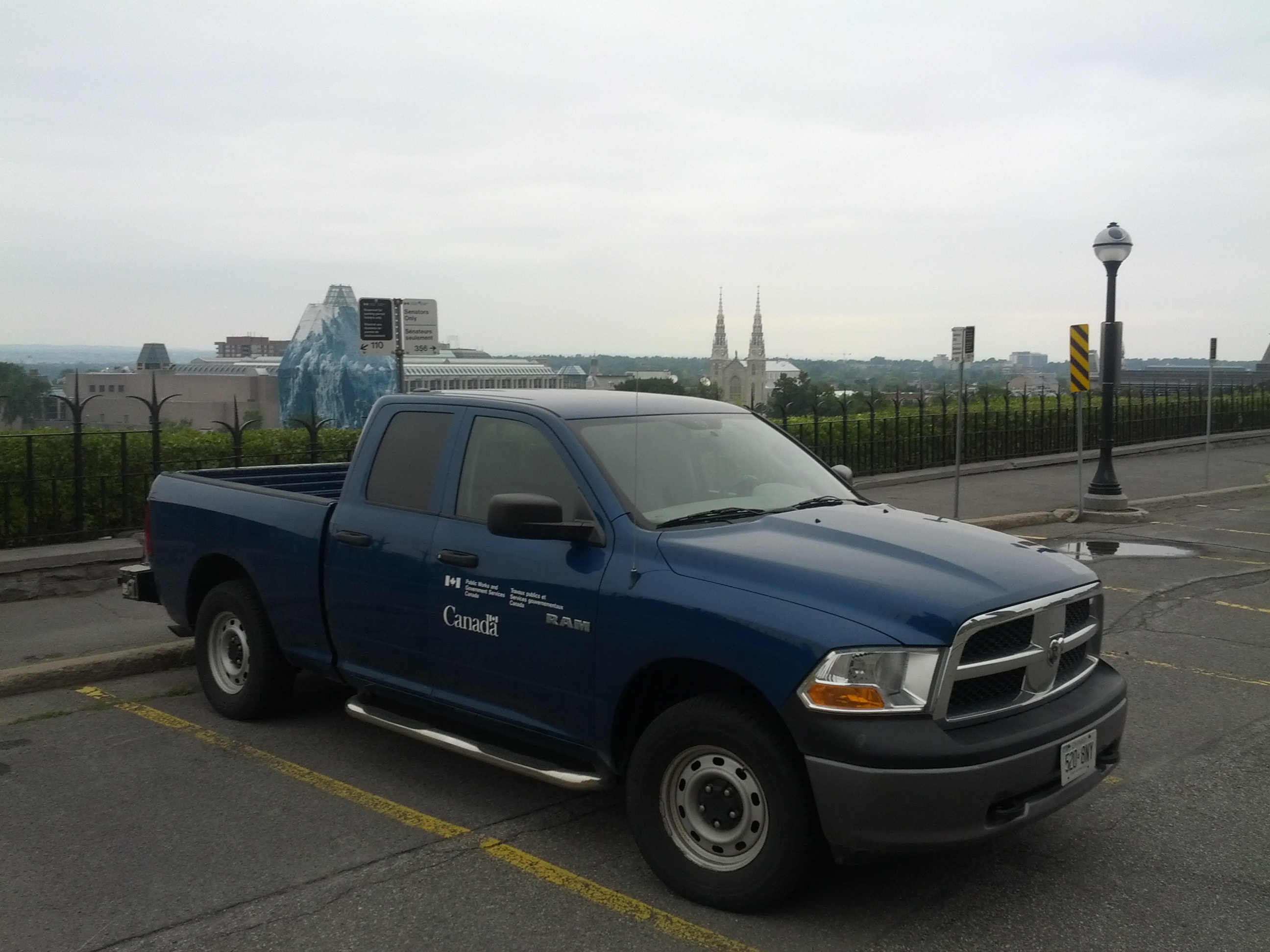 Carro do Governo do Canadá, em Ottawa.